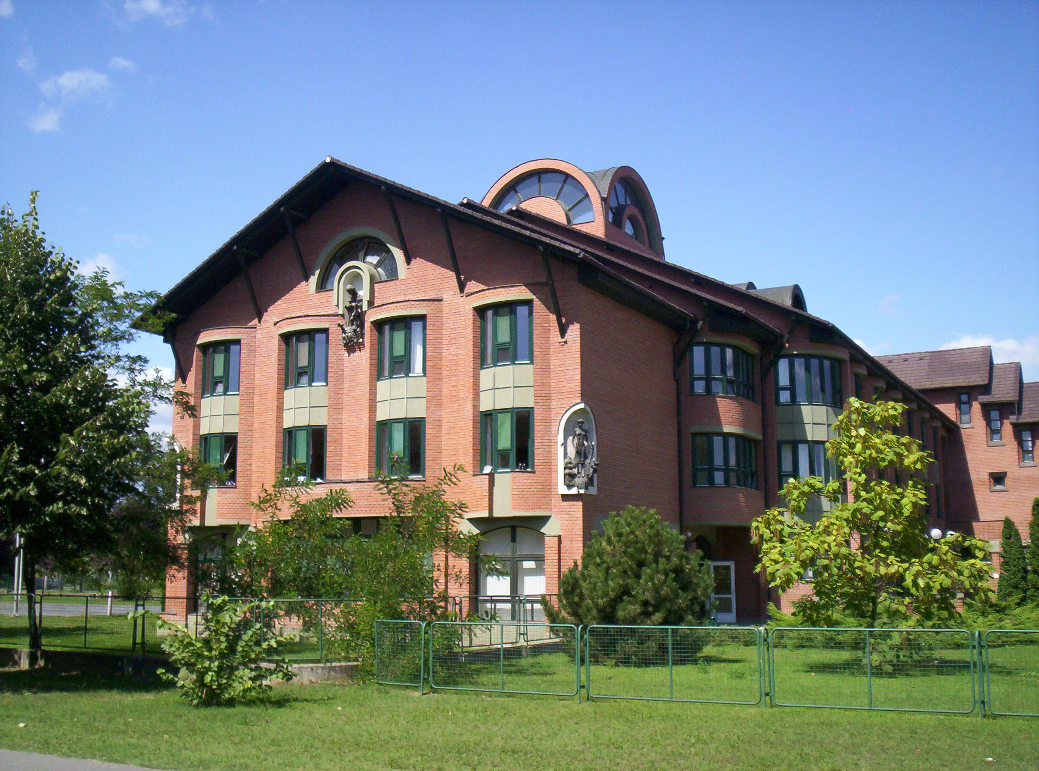 Magyarországi németek általános művelődési központja óvoda általános iskola gimnázium szakközépiskola kollégium. - Baja, Duna u. 33 – photo taken by uploader User:Csanády in 2006.